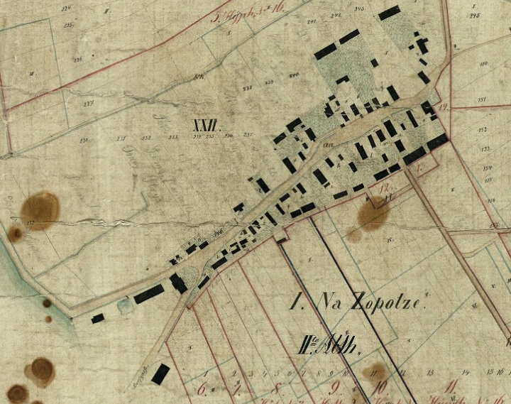 Plan des Ortes Grudschütz bei Oppeln in Oberschlesien. 1854.